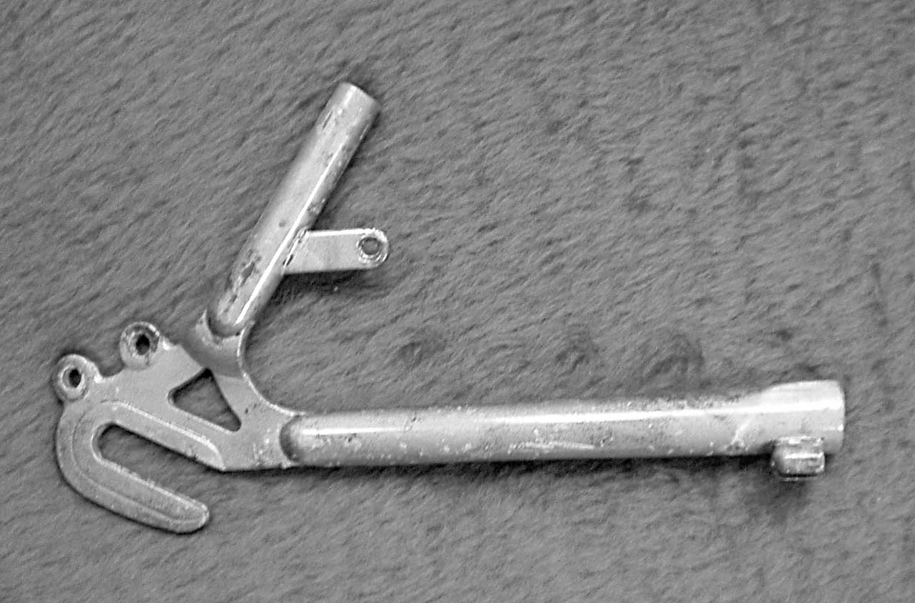 Ausfallende